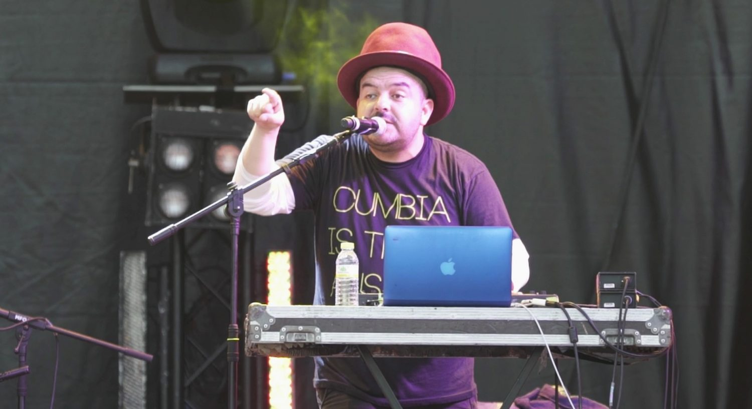 Veranos de la Villa 2017 se desplegó ayer por diferentes puntos de Madrid. Lo hizo con circo y con el sonido más contemporáneo de la música mexicana como guiño a la presencia de Madrid como ciudad invitada a la próxima Feria del Libro de Guadalajara (México).